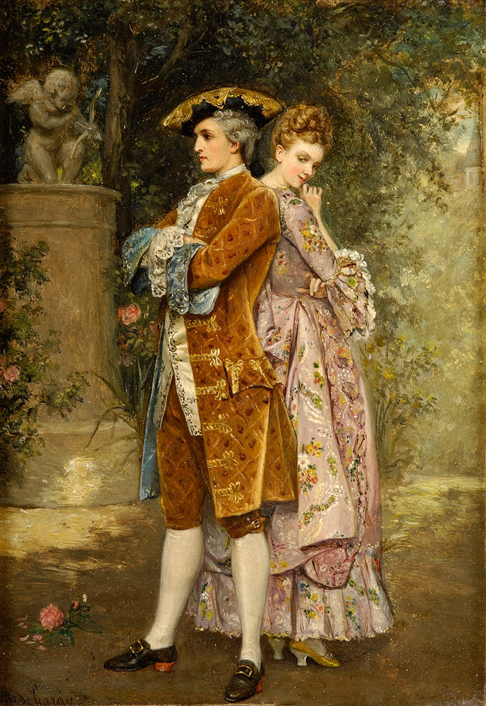 Das erste Rendezvous. Signiert. Öl auf Holz, 19,5 x 13,5 cm